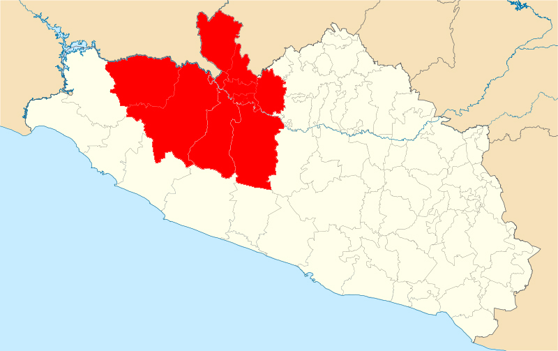 Mapa de los municipios que integran la Tierra Caliente de Guerrero